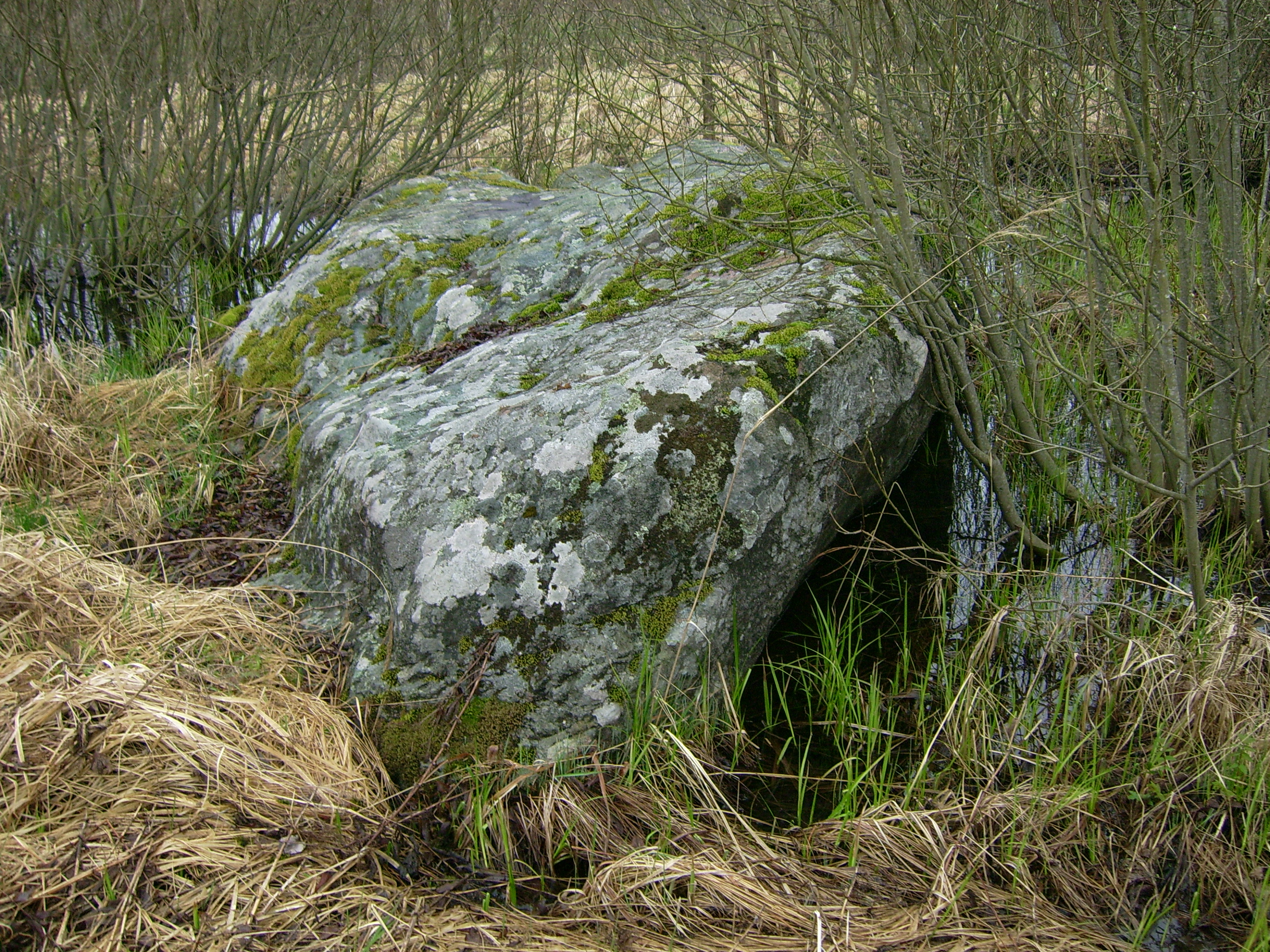 Tamošaičių akmuo